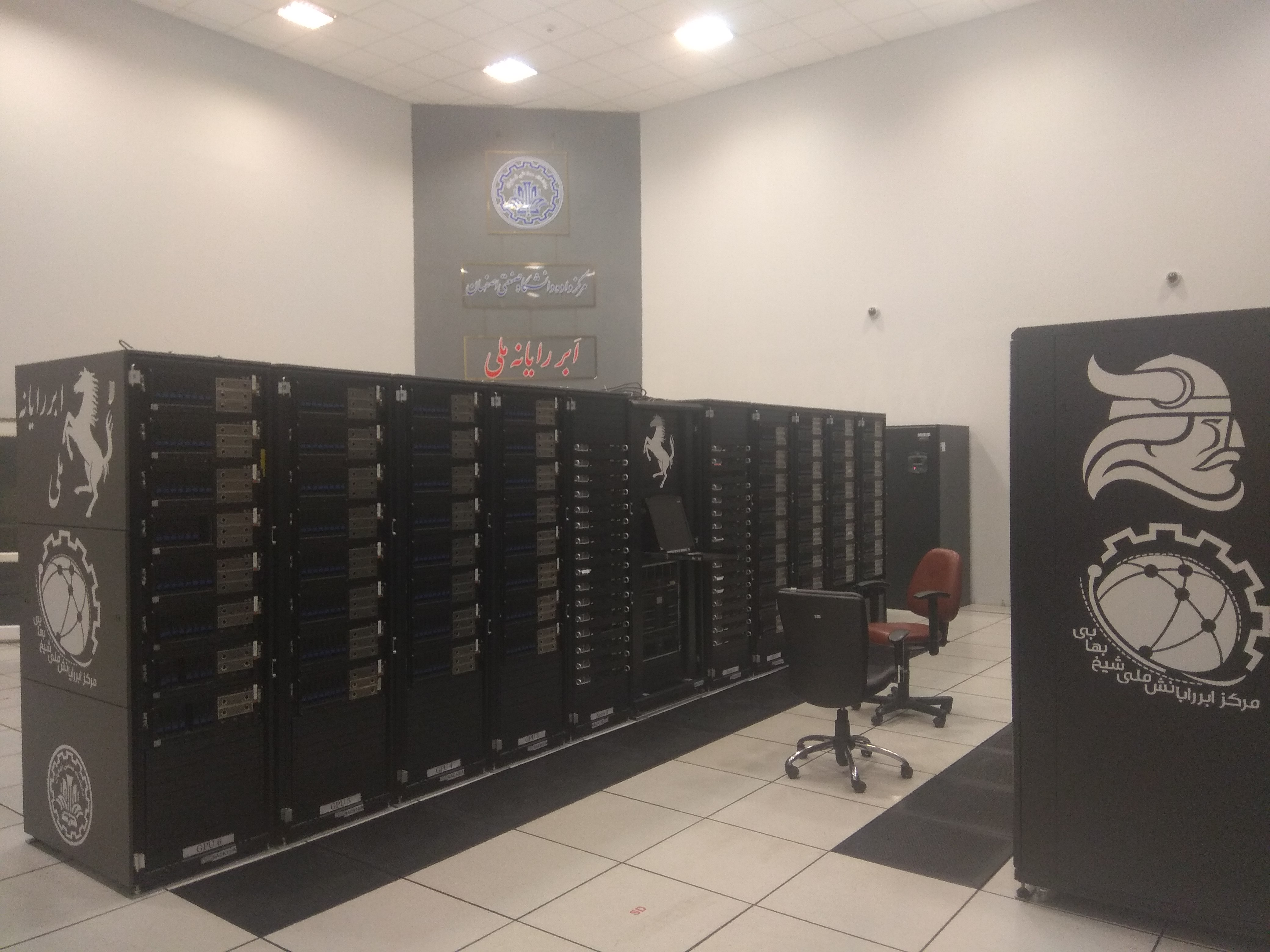 تصویری ازابررایانه‌های رستم و رخش ابررایانه ملی شیخ بهایی در دانشگاه صنعتی اصفهان